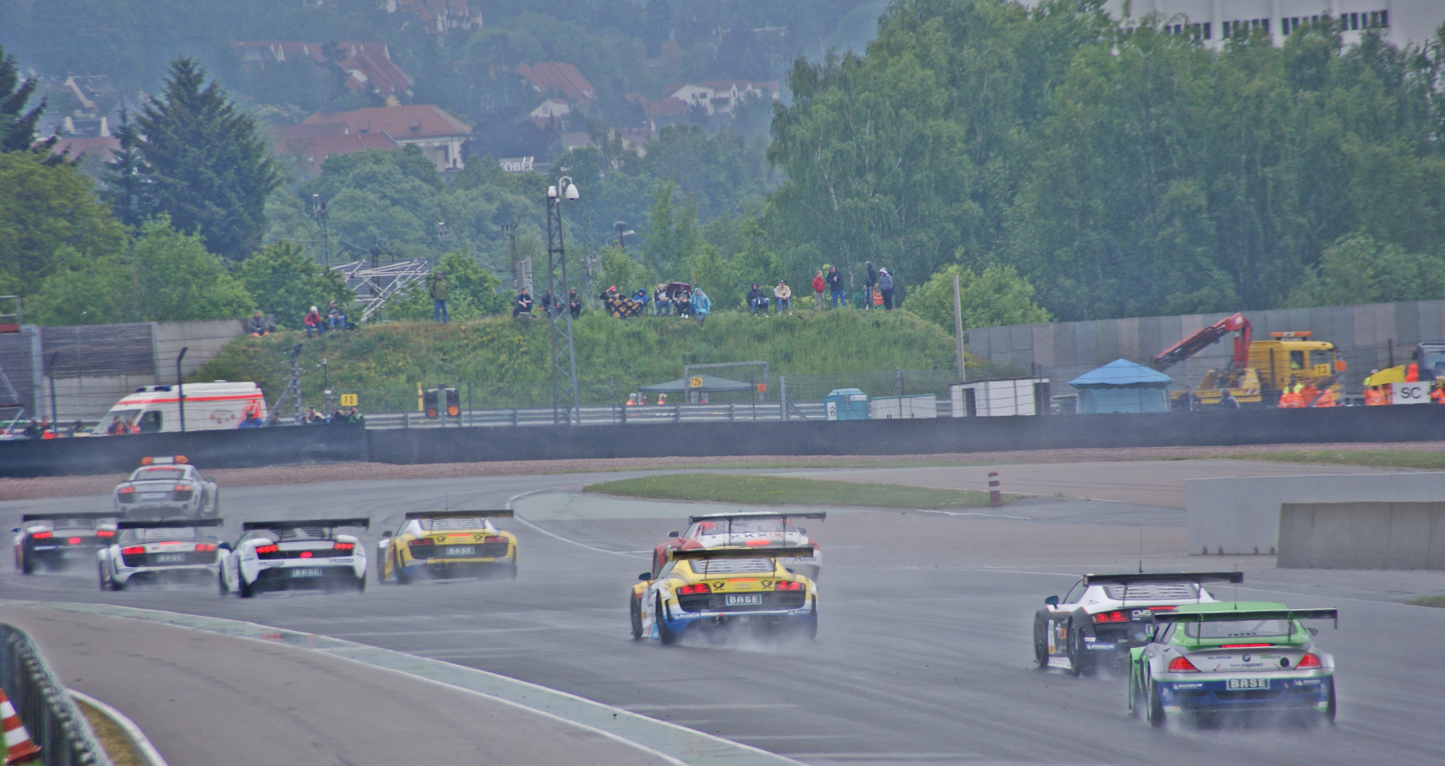 Einführungsrunde der ADAC-GT-Masters 2011 auf dem Sachsenring (Das Photo wurde von Mdiet bearbeitet)